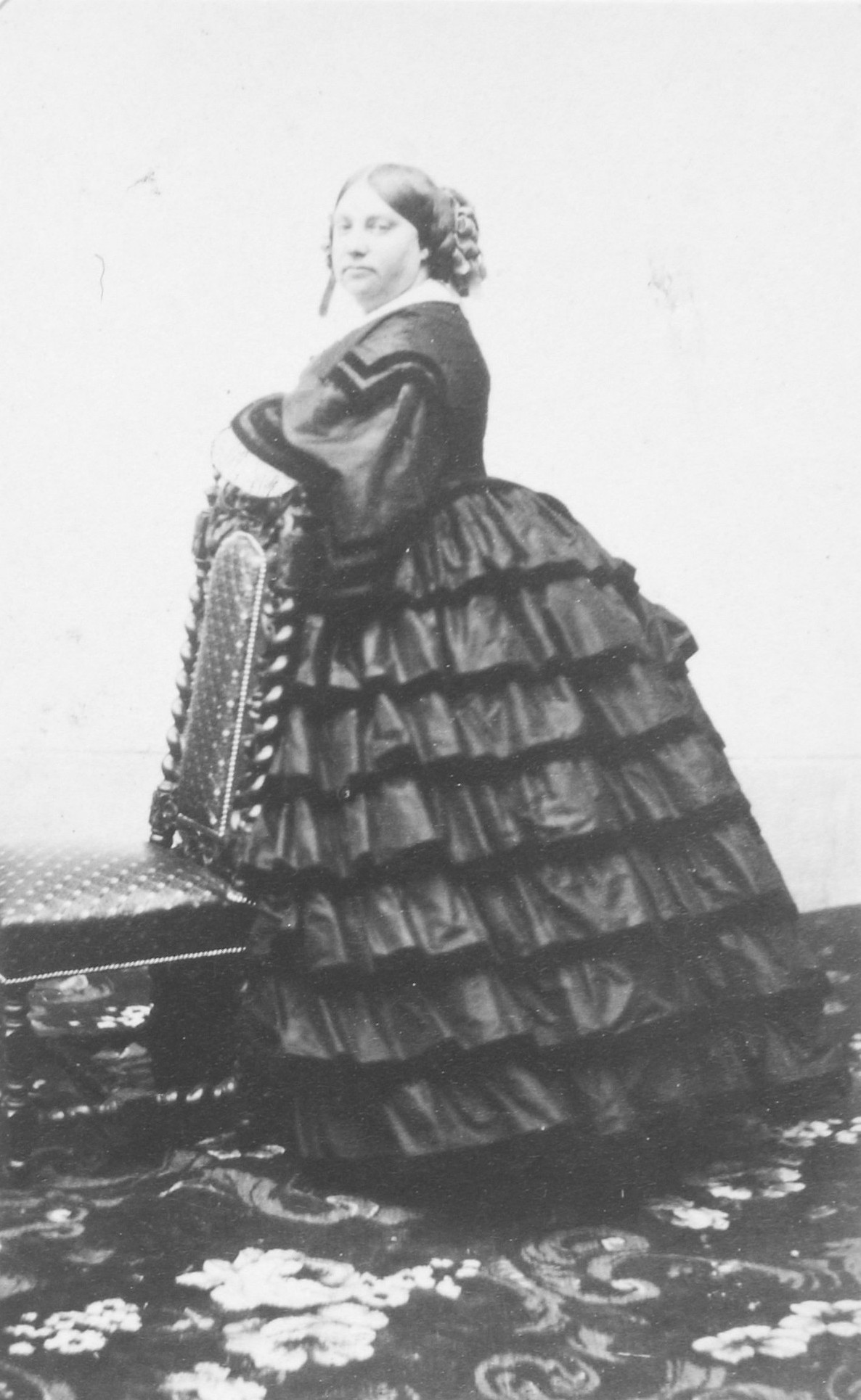 Duchessa vedova di Parma e Piacenza